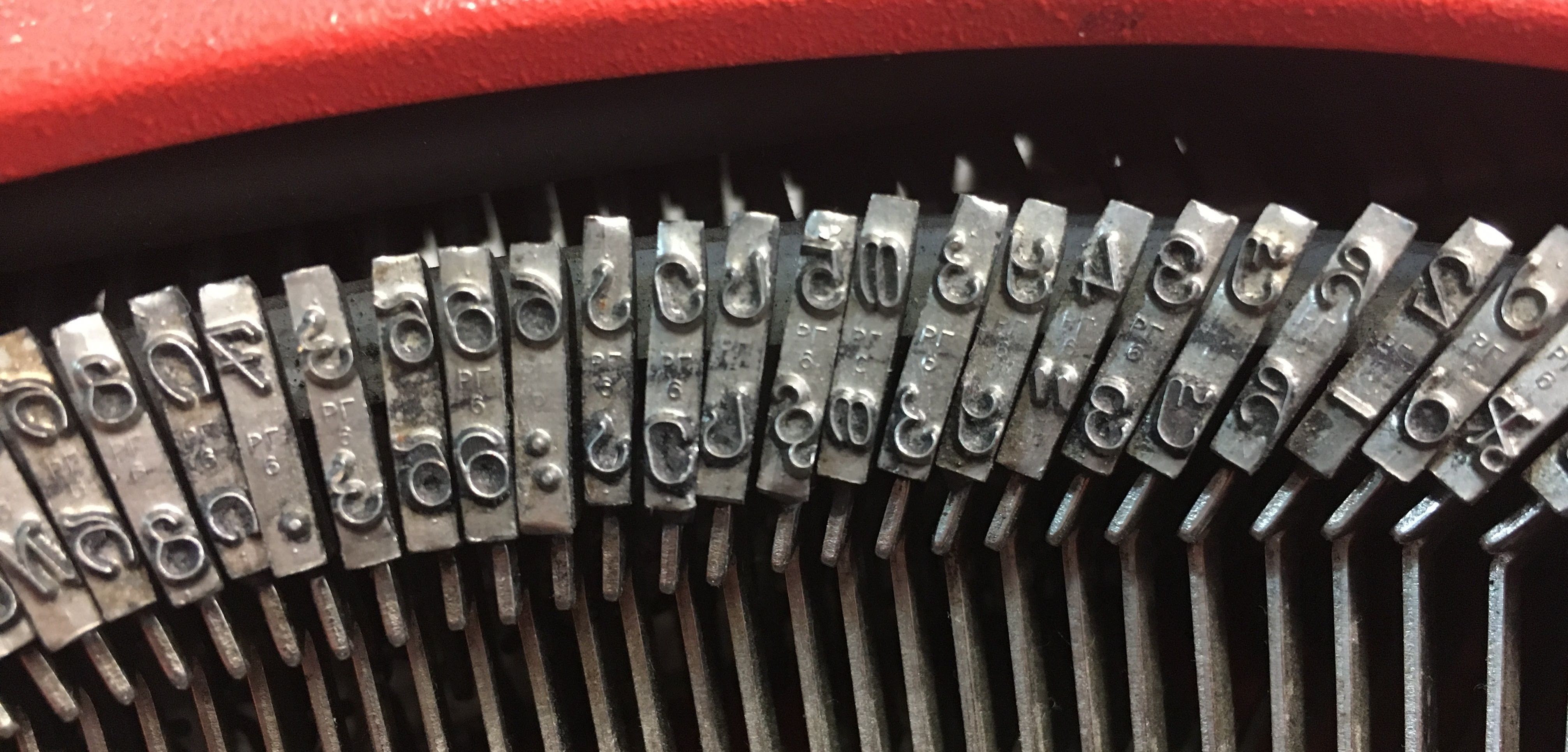 მხედრულის მთავრული ასოები საბეჭდ მანქანაზე